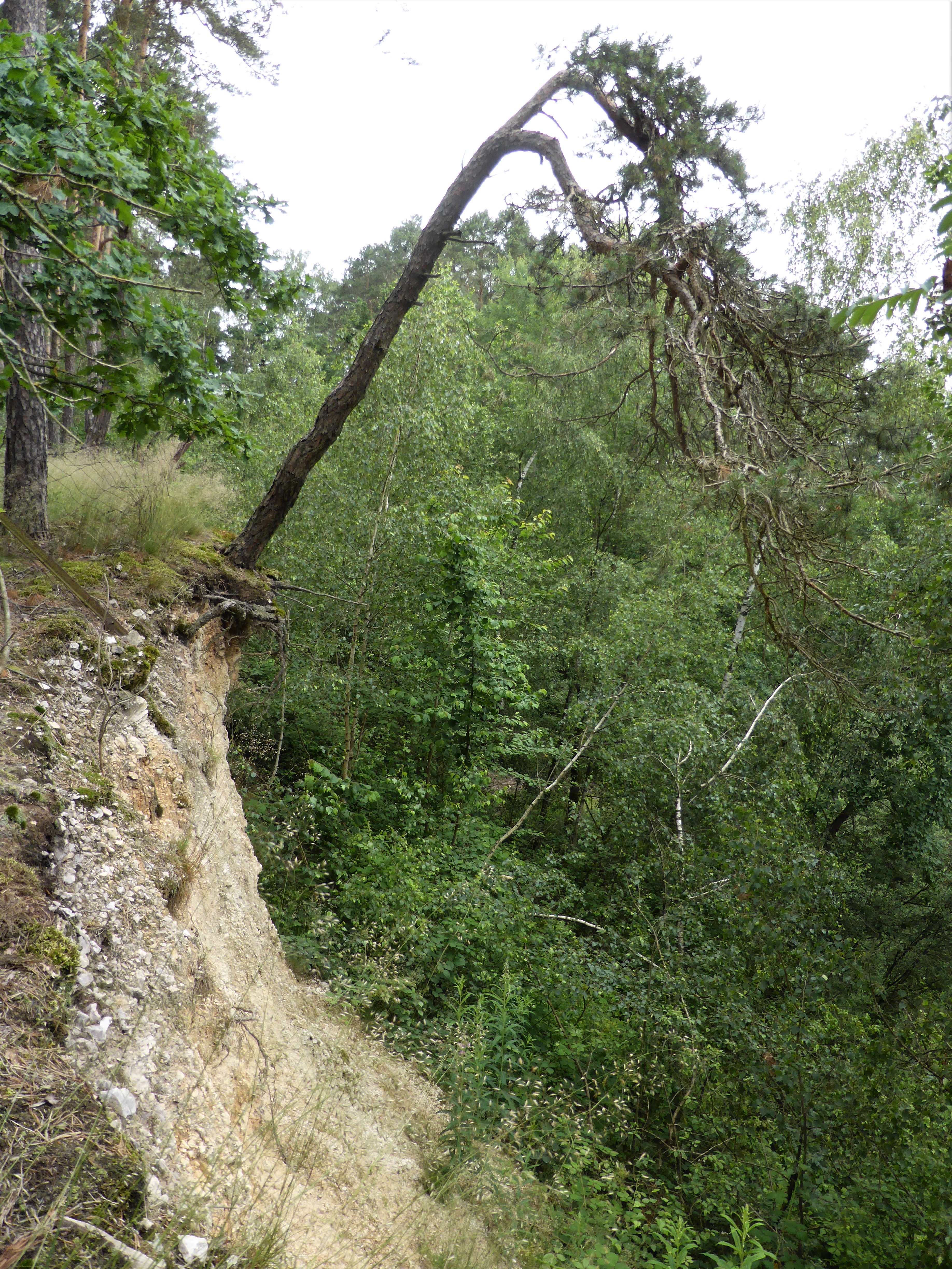 Die Grube ist sehr stark zugewachsen und teilweise eingezäunt. An der oberen Kante verläuft ein Wanderweg durch den Kiefernwald.